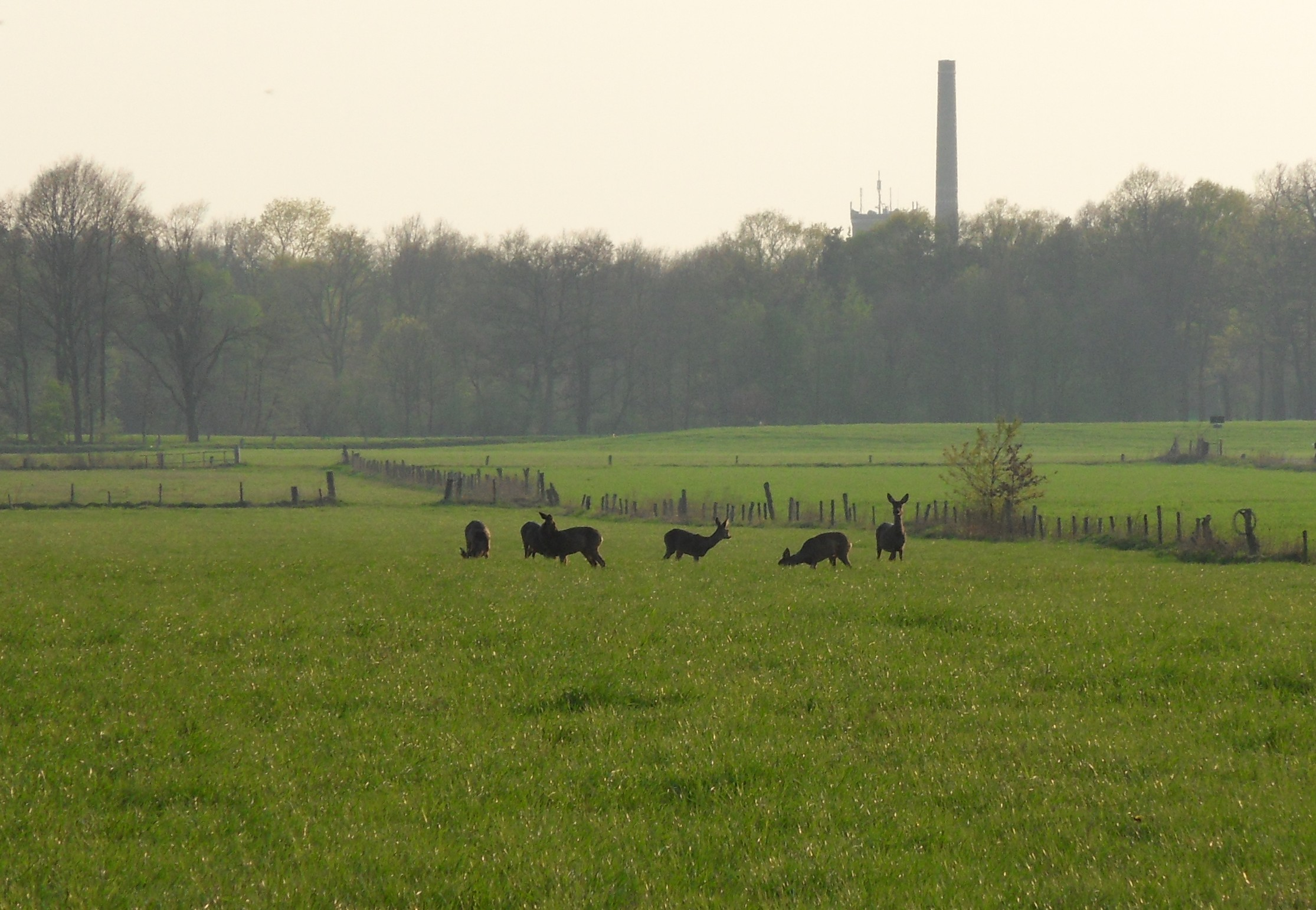 urnenveld nabij de grensweg met op achtergrond van Heek